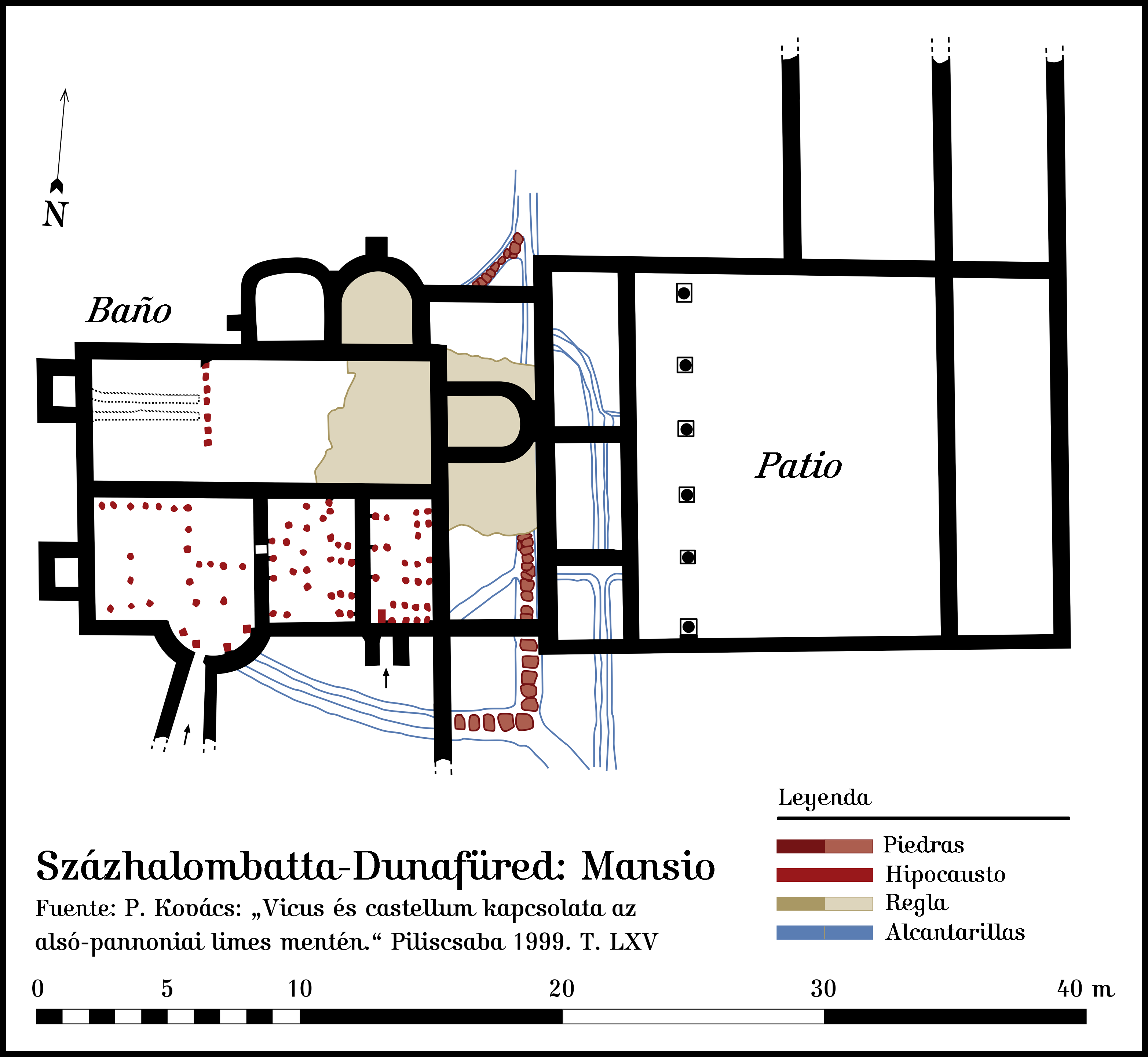 Vicus de la fortaleza Százhalombatta-Dunafüred (Matrica, Hungría): Mansio. La fuente de este plan es para especificar en el dibujo.